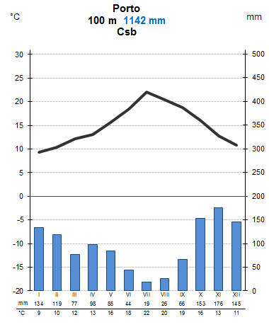 Porto Kliimadiagramm